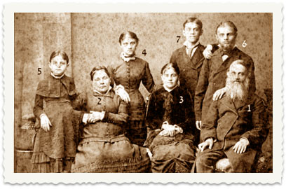 משפחת בלקינד במוגילוב 1882, ערב עליית הבנים לארץ ישראל